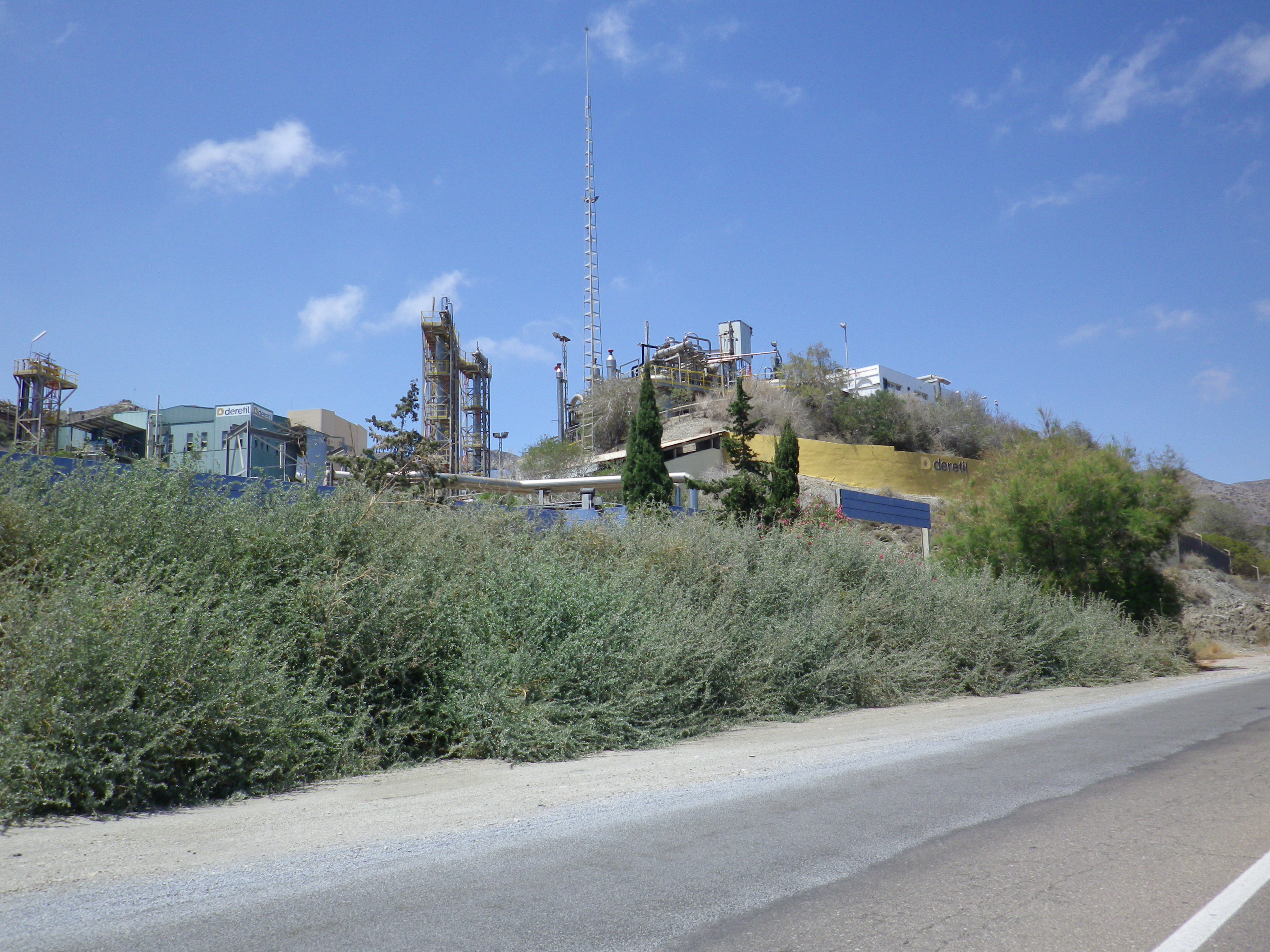 Fotografía de la planta de la empresa farmacéutica Deretil en Villaricos, municipio de Cuevas del Almanzora, provincia de Almería, Andalucía, España.